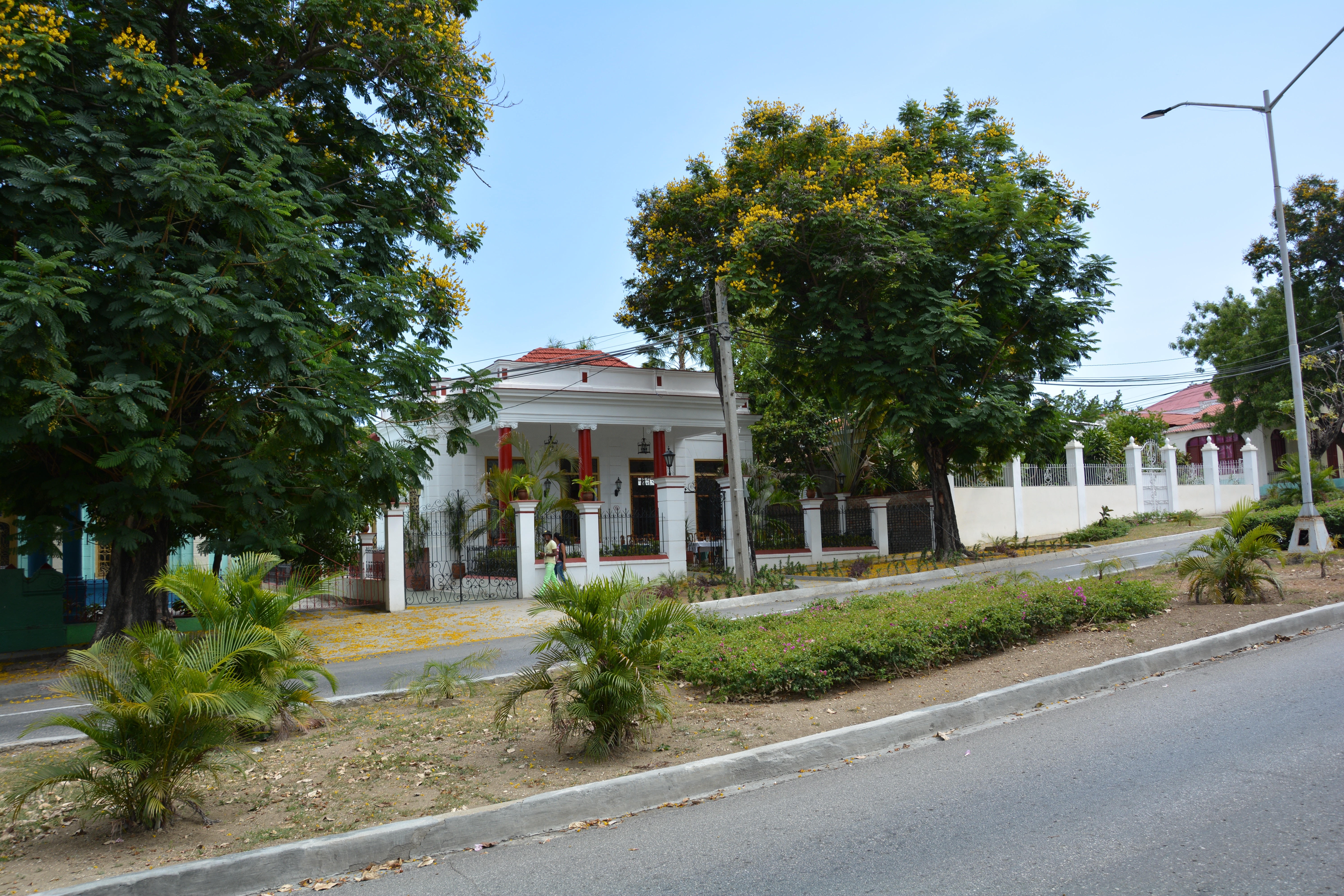 Villa in Vista Alegre